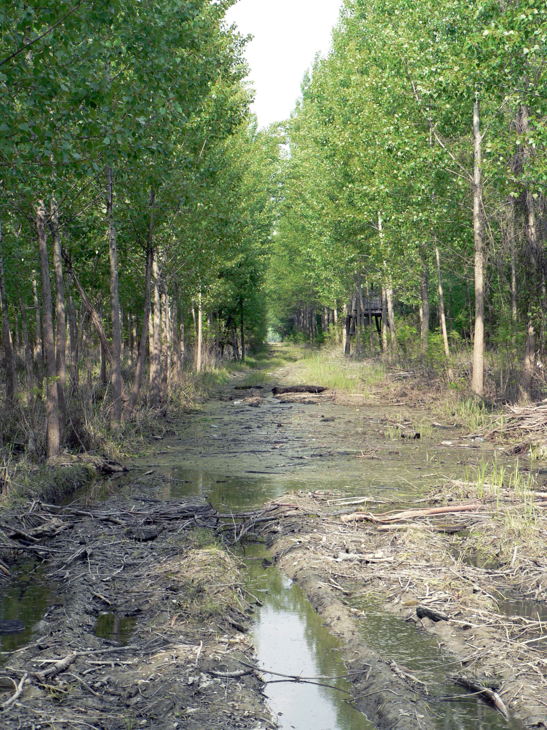 Ковиљско-петроварадински рит, плантаже тополе Licensing